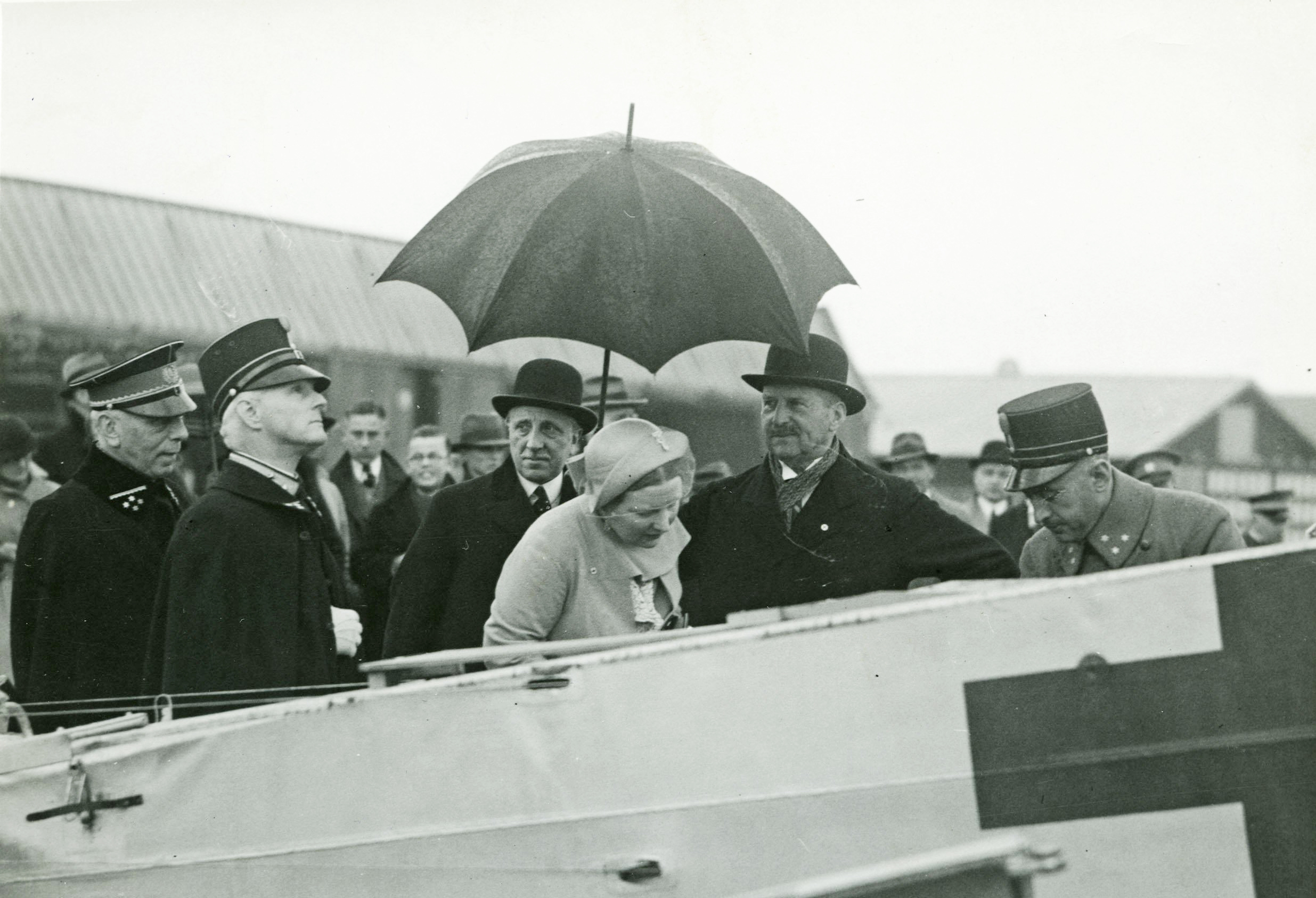 Bezoek van Prinses Juliana aan Soesterberg op 18 mei 1935. Hier bekijkt zij het ambulancevliegtuig, een Fokker S.IIa. Links kolonel P.W. Best, commandant van de Luchtvaartafdeling.